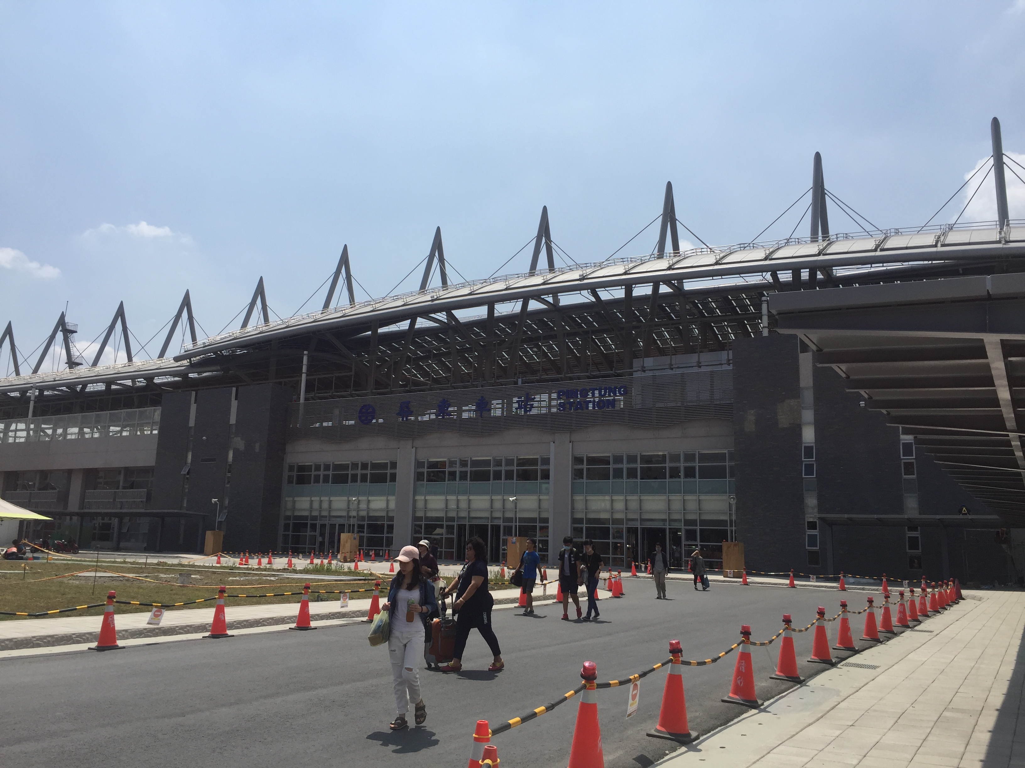 臺灣鐵路管理局屏東車站。